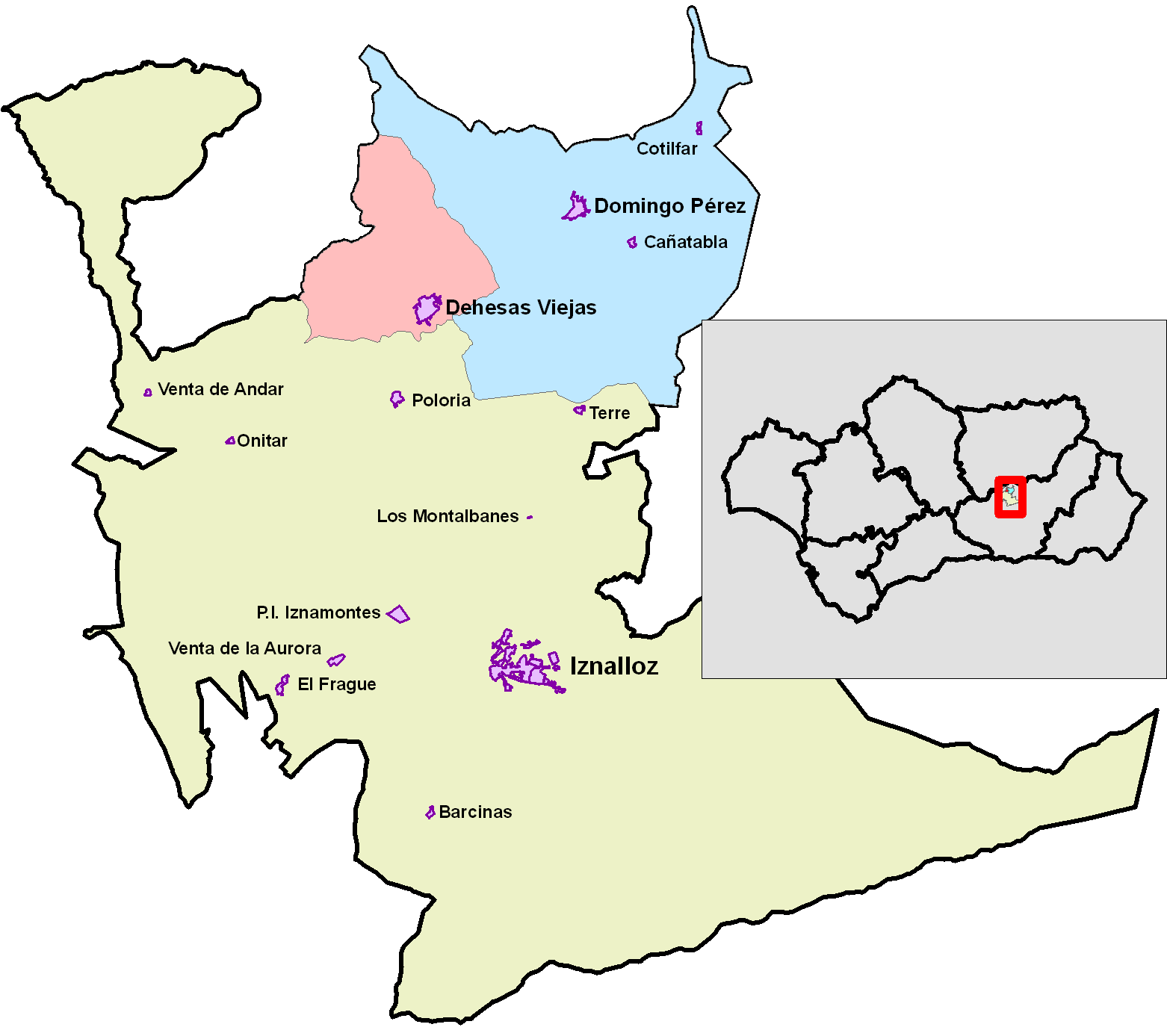 Entidades Locales Autónomas del municipio de granadino de Iznalloz.